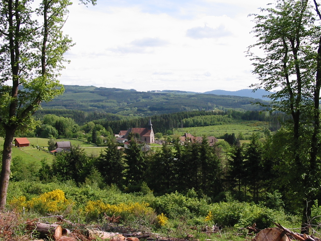 Le Puid Commune du canton de Senones (Vosges) Partie est du village, vue de la Tête de la Molère